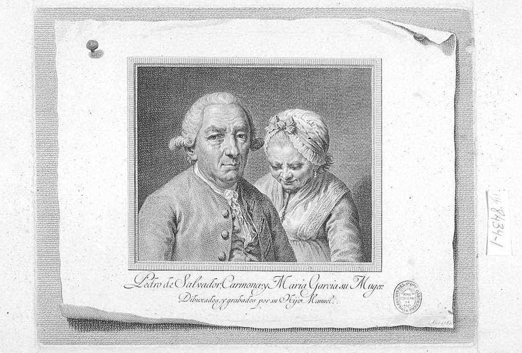 Manuel Salvador Carmona: Pedro Salvador Carmona y Maria García, dibujo sobre papel agarbanzado lápiz negro y rojo, Biblioteca Nacional, Madrid, Iconografía Hispana, 8434-1